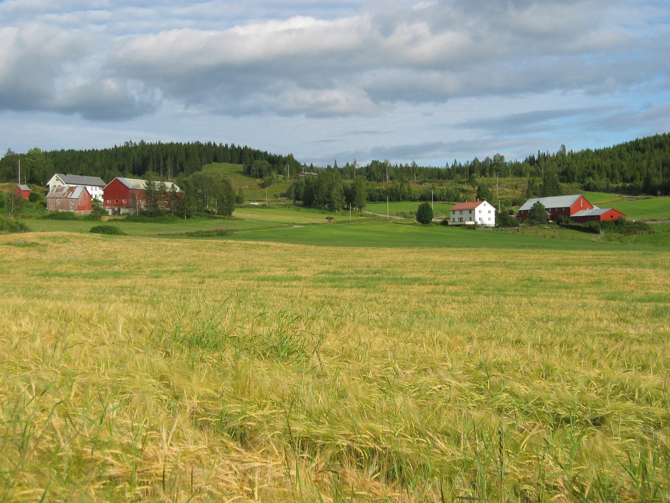 Fra Stod. Finstad-gårdene.